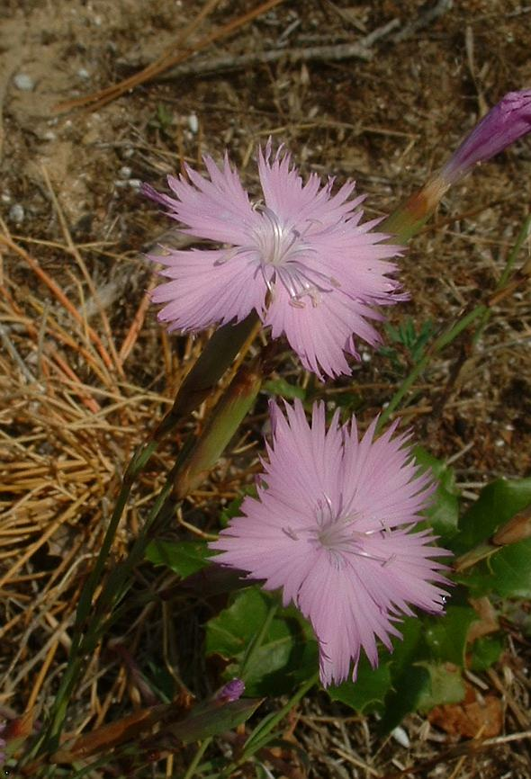 Œillet de France, Talmont-Saint-Hilaire